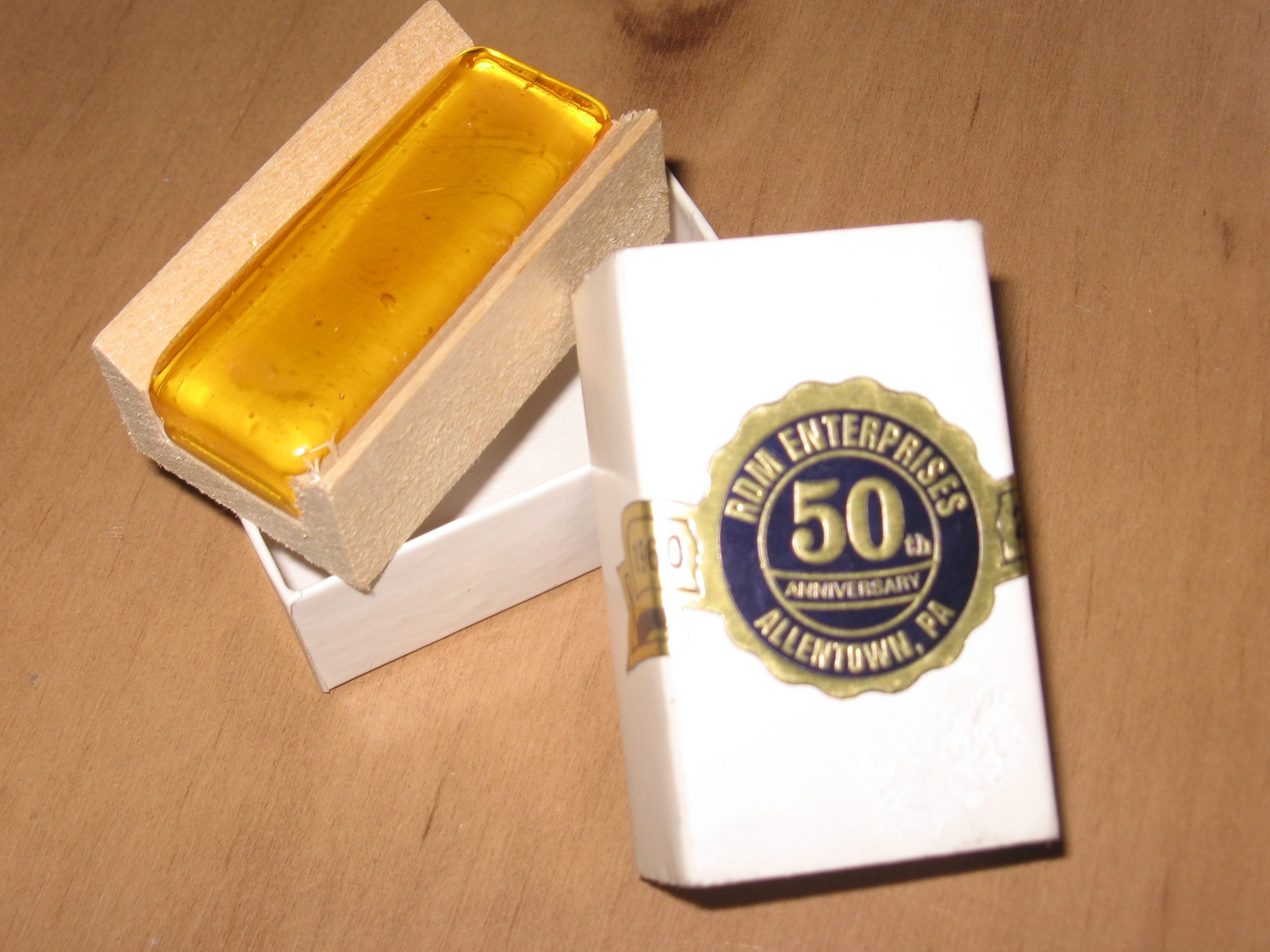 שרף לקשת הכינור